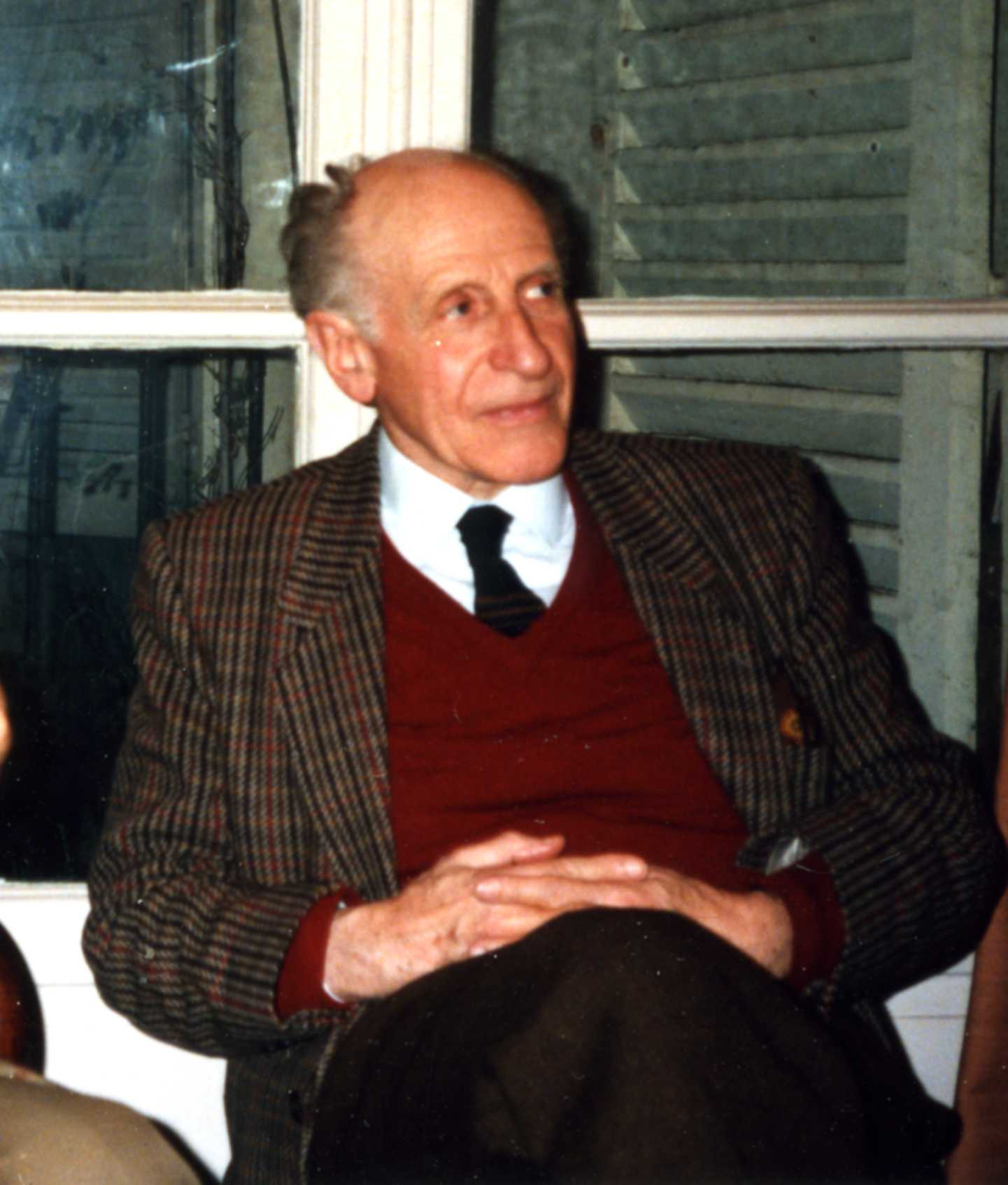 Le poète et romancier Georges-Emmanuel Clancier (né en 1914) à Paris en 1987.